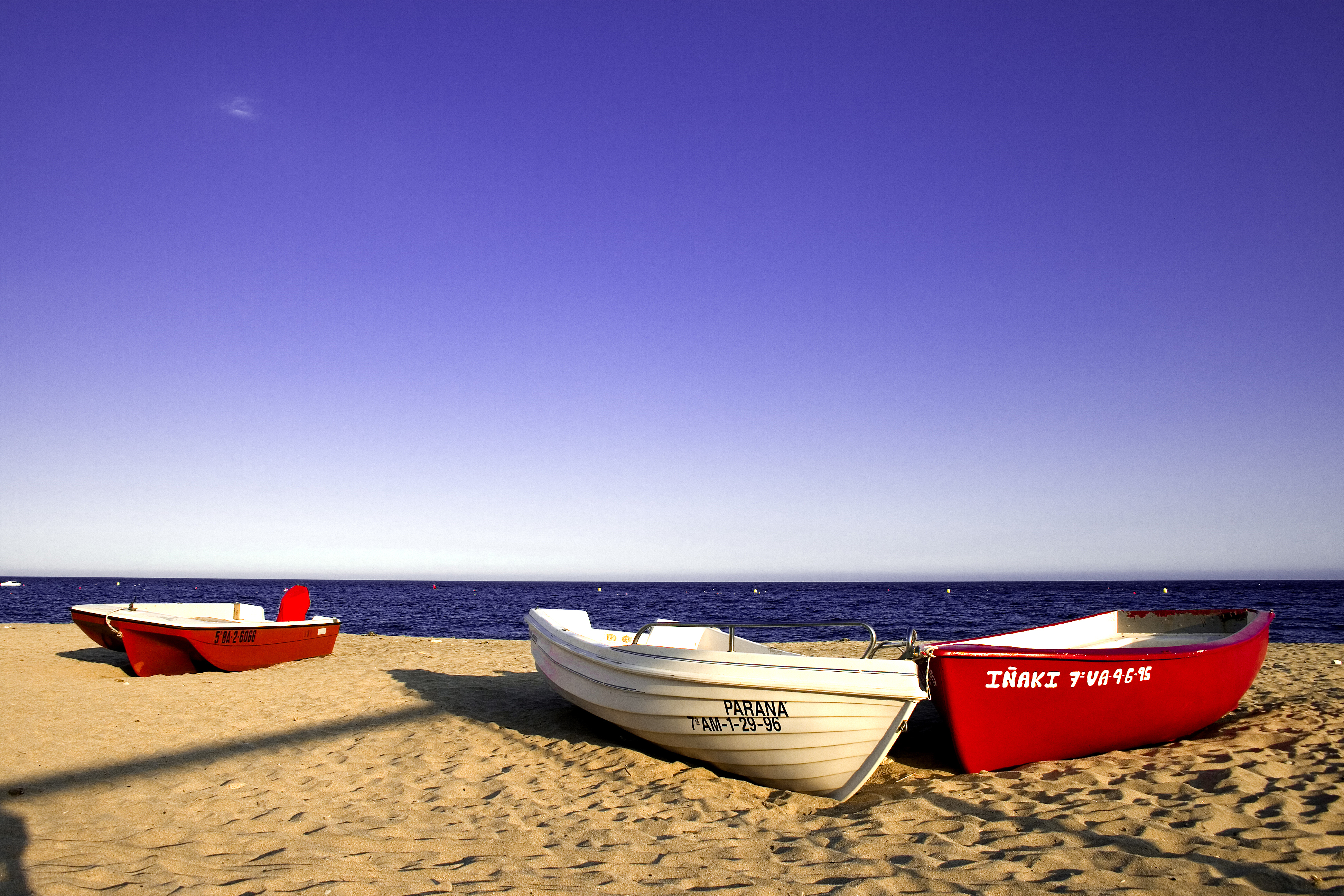 Se puede ver en